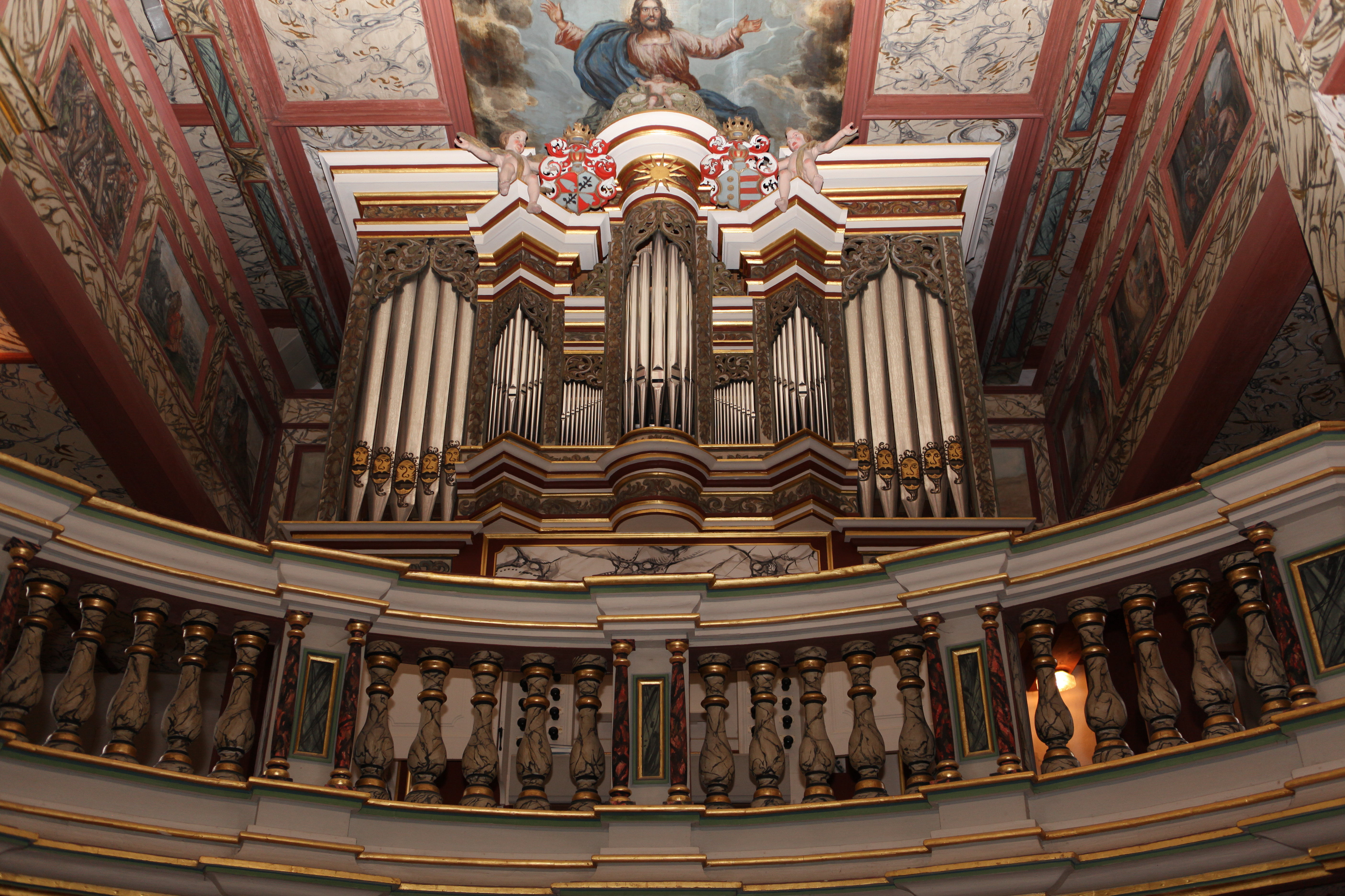 Bedheim-St.Kilian-Hauptorgel